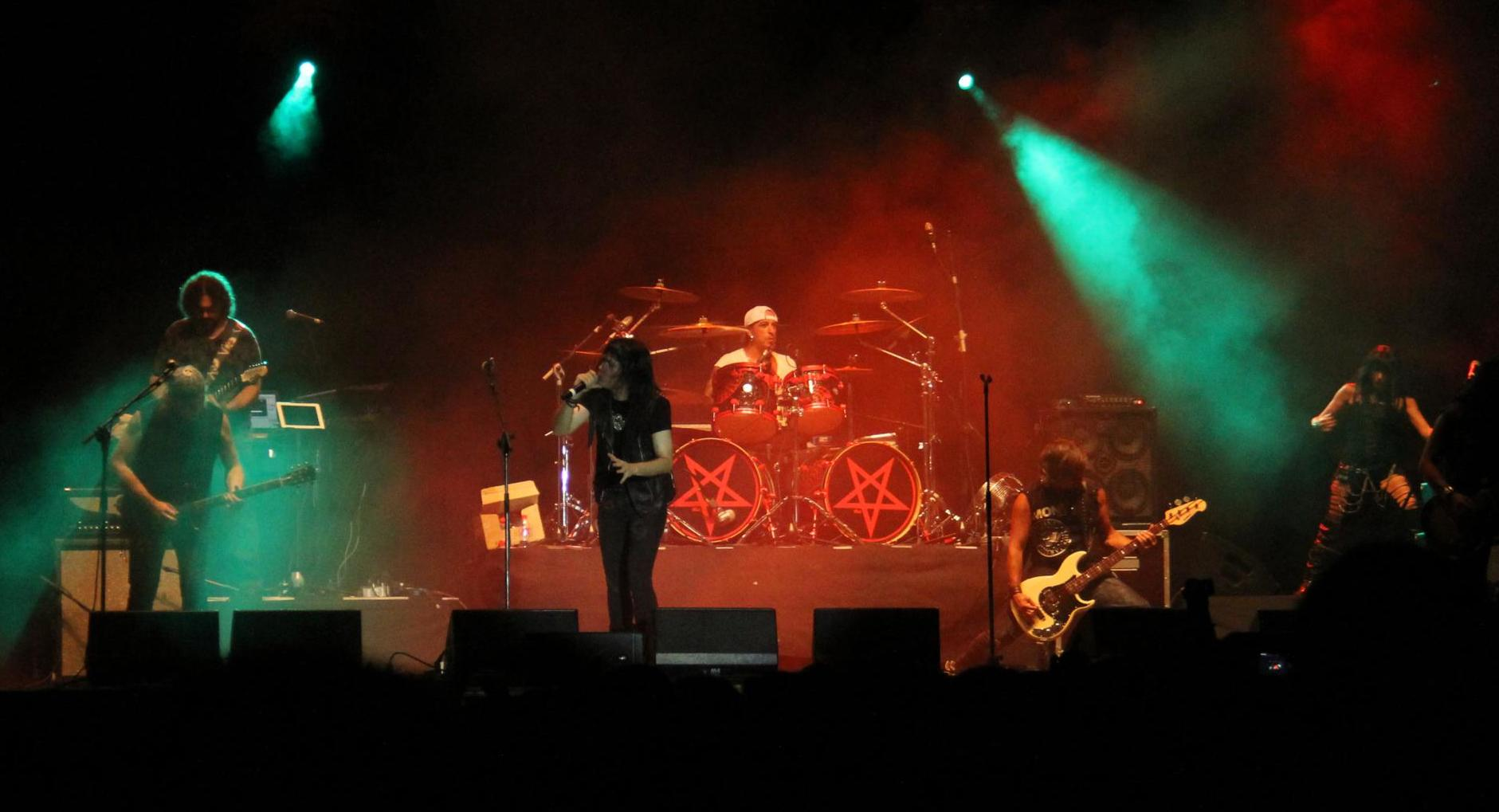 El grupo Mägo de Oz en un concierto de 2013.